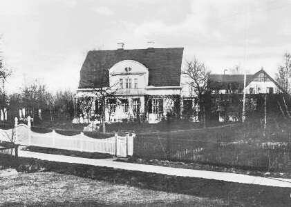 Villa Wahlström på Järlavägen 23 ritad 1905 av arkitekt Torben Grut. Bokförläggare Per Carl Wahlström var åren 1906 - 1932 bosatt i villan.